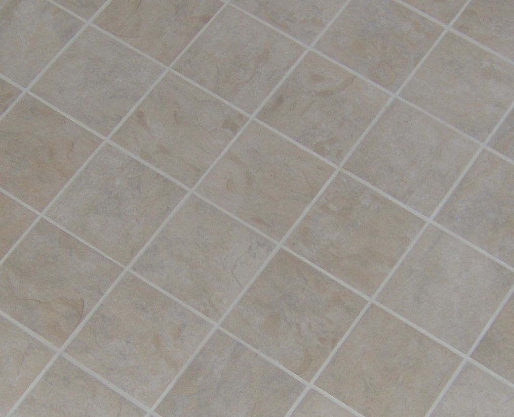 6"x6" porcelain floor tiles